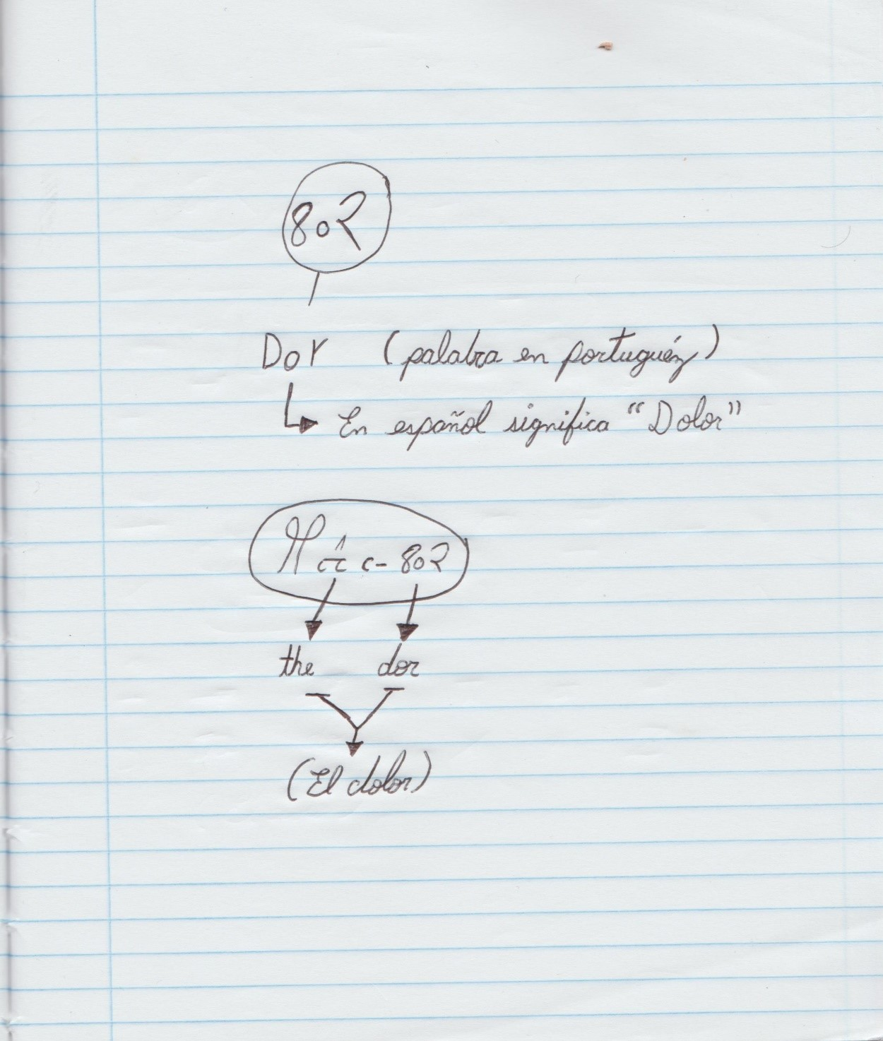 decodificacion de algunas palabras